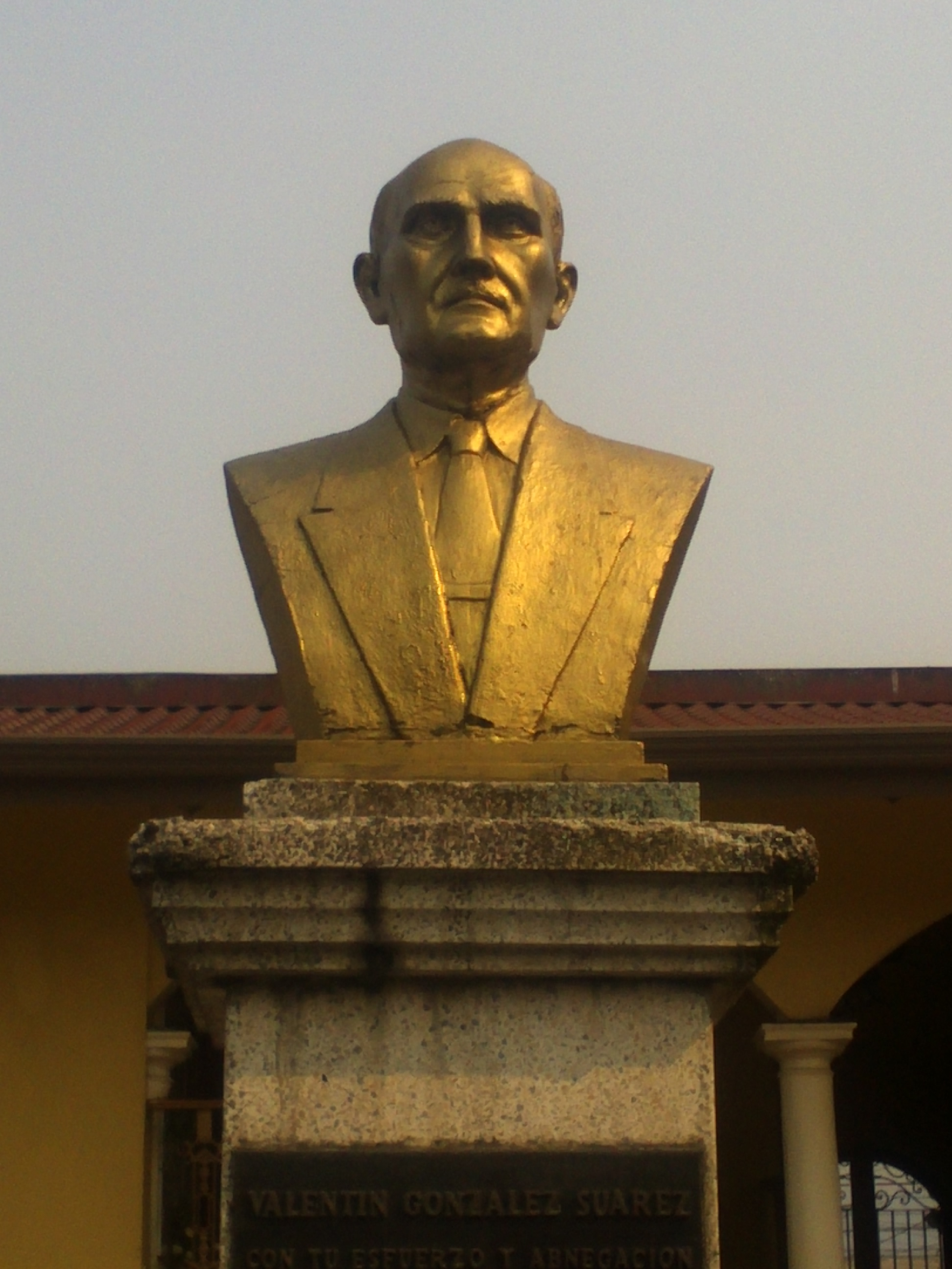 Busto en la tumba de Valentín González Suárez en el Panteón de Orizaba, Veracruz.